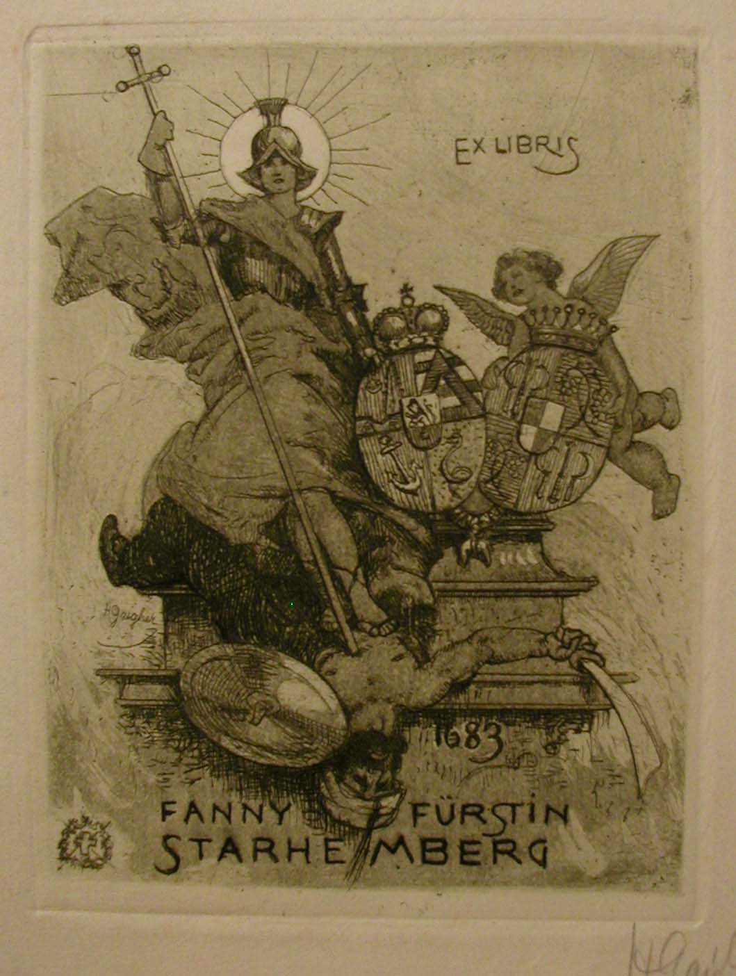 Ex-libris Fanny Fürstin Starhemberg, geb. Larisch-Mönnich, mit Allianzwappen Starhemberg/Larisch-Mönnich